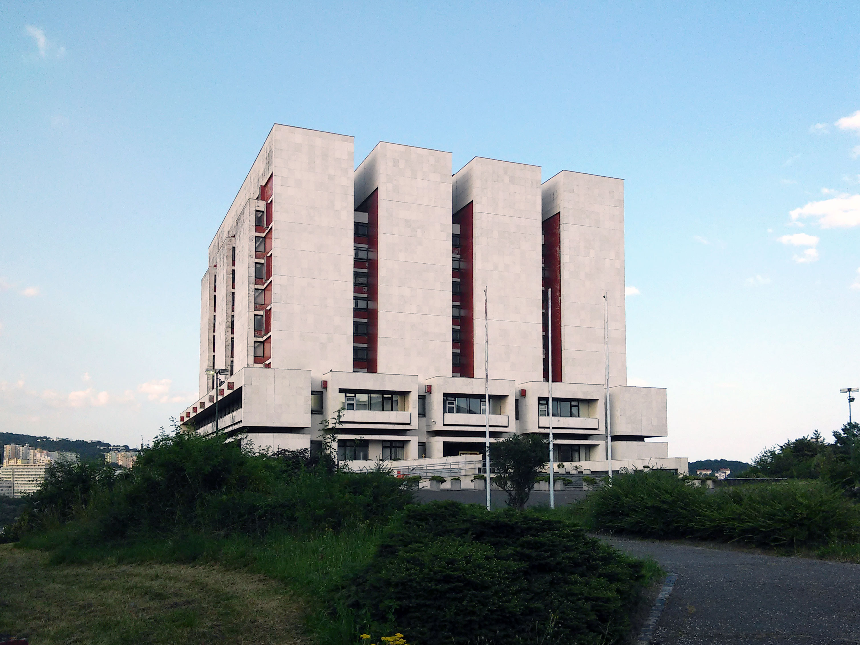 Slovenský národný archív, Drotárska cesta 42, Staré Mesto, Bratislava